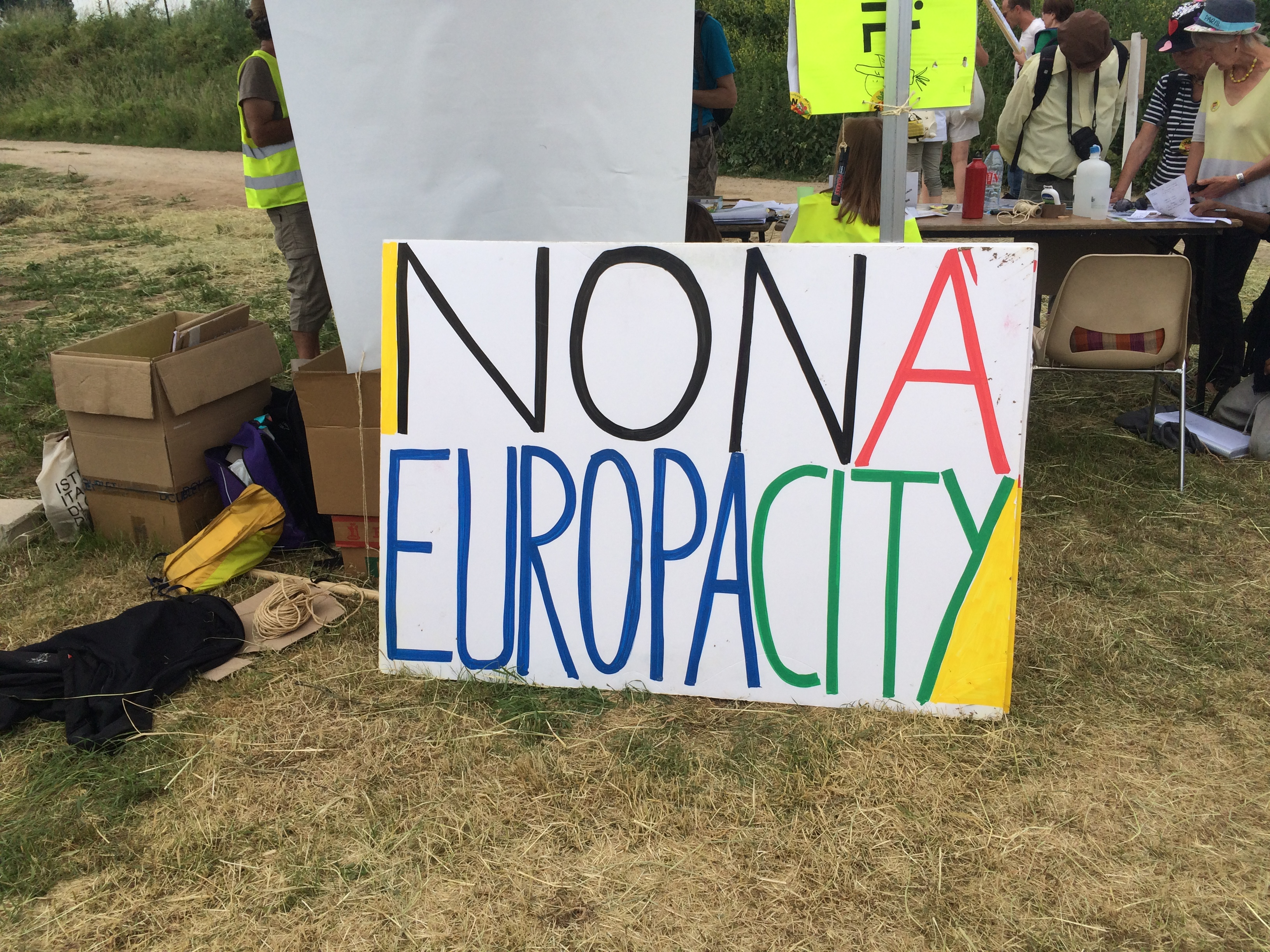 Lors du rassemblement du 27 mai 2018, une pancarte "Non a Europa City"